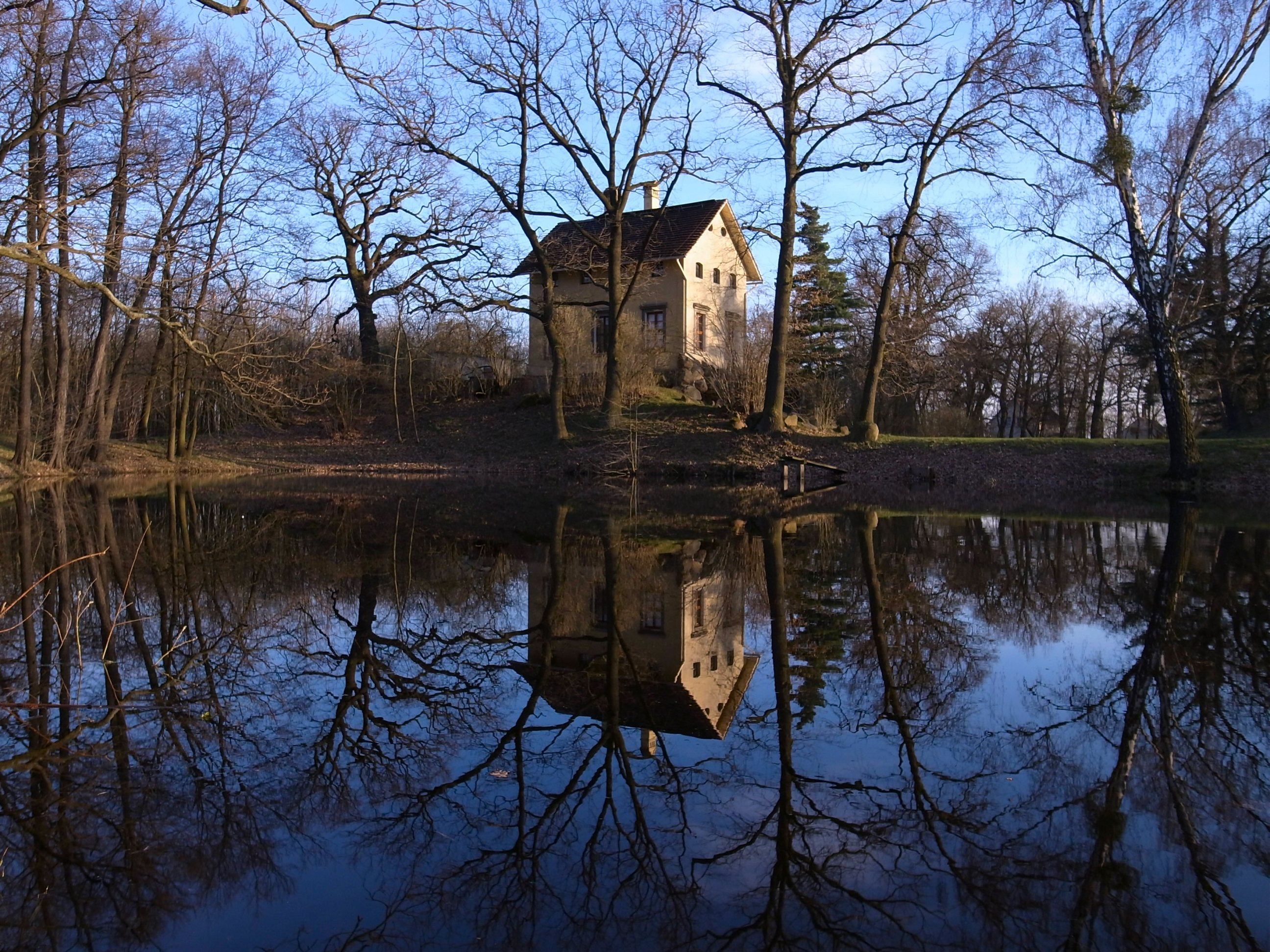 Wörlitz,Piemonteser (Italienisches) Bauernhaus